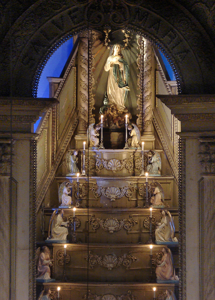 Interior da Igreja de Nossa Senhora da Conceição, Porto Alegre, Brasil. Altar-mor com imagem da Padroeira